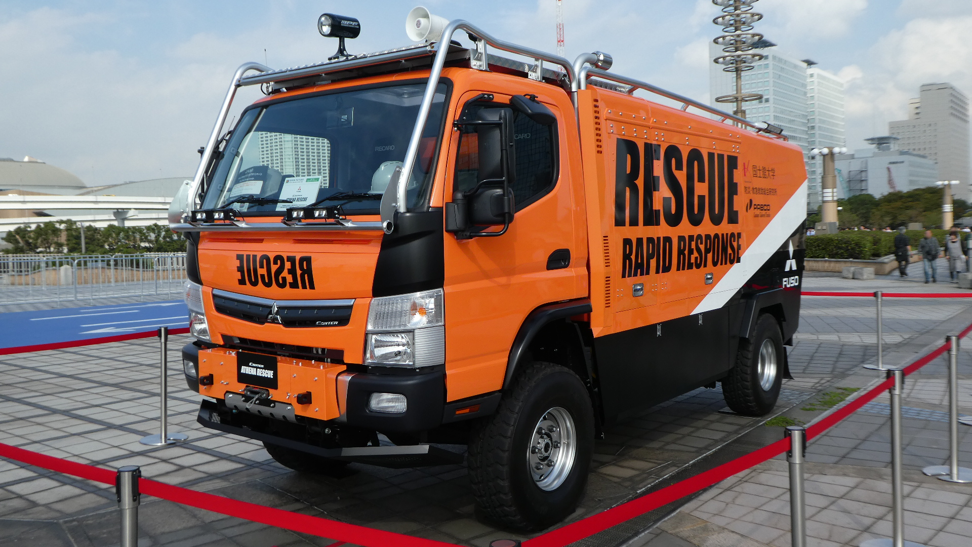 三菱ふそう キャンター 4輪駆動車の救助車両（参考出品車）。国士舘大学 防災・救急救助総合研究所との共同企画。